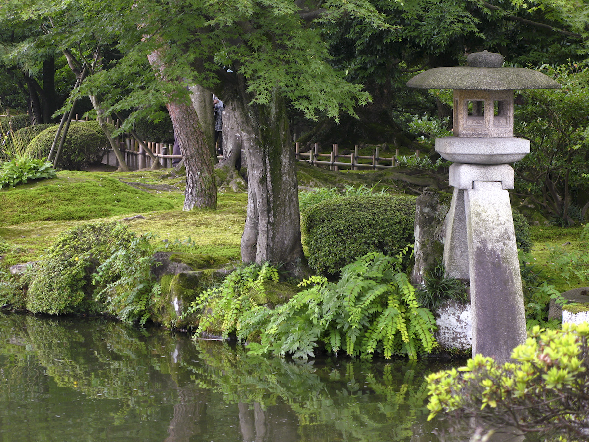 Kenroku-en, Kanazawa, Ishikawa Prefecture, Japan Kotoji Lantern